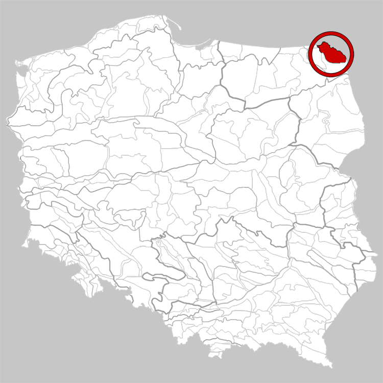 Physico-geographical regionalization of Poland Mezoregion 842.73 Eastern Suwałki Lakeland Regionalizacja fizycznogeograficzna Polski Mezoregion 842.73 Pojezierze Wschodniosuwalskie